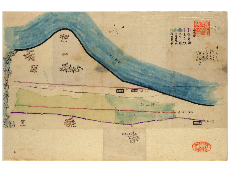 明治年間に於ける常願寺川河流改修に伴う流路変更を示す図であり、新河流に於いて東西に属すべき村名が記されている。